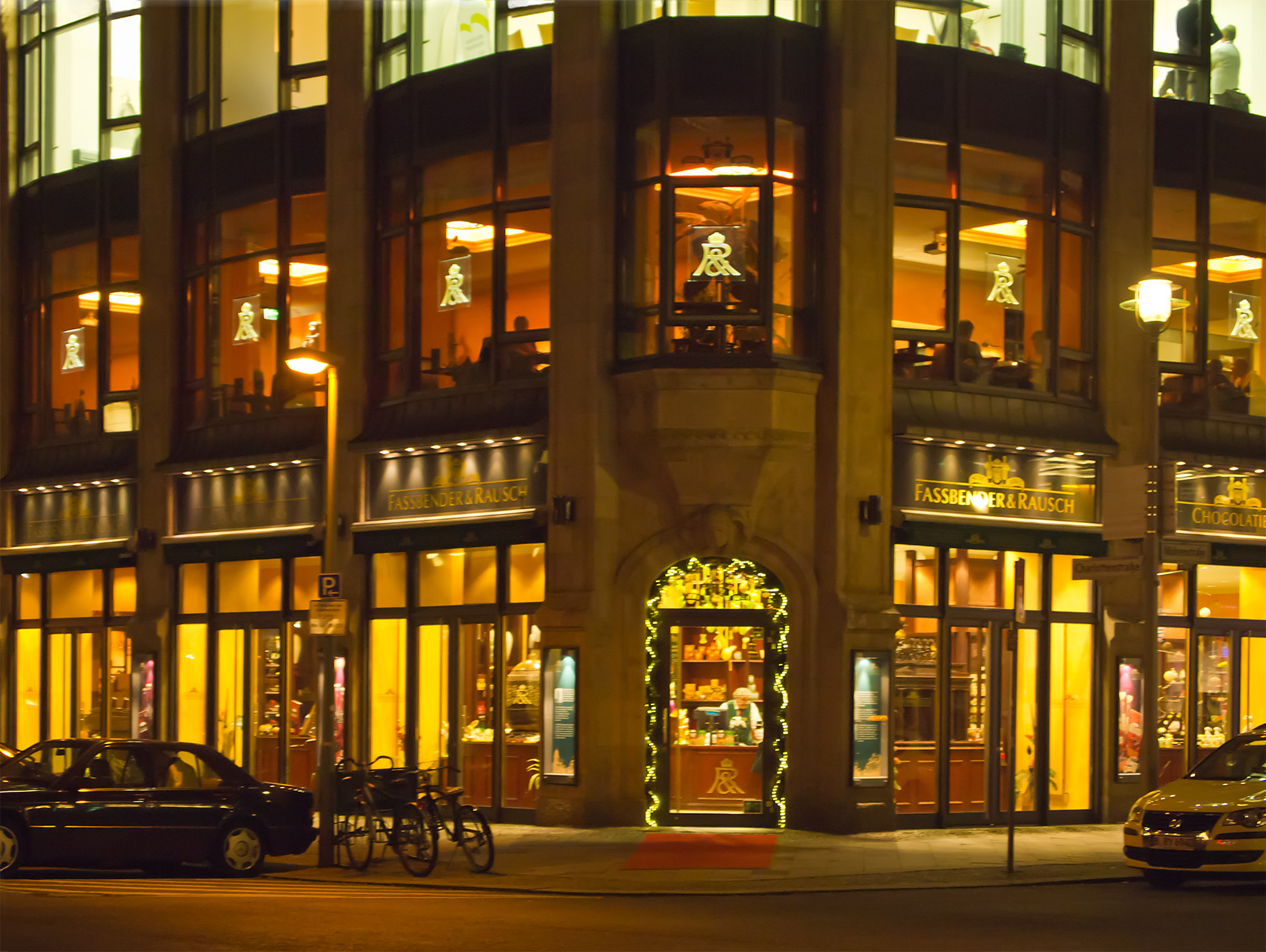 Rausch Schokoladen Geschäft am Gendarmenmarkt in Berlin-Mitte, Charlottenstraße 60, Ecke Mohrenstraße O3038293-dh